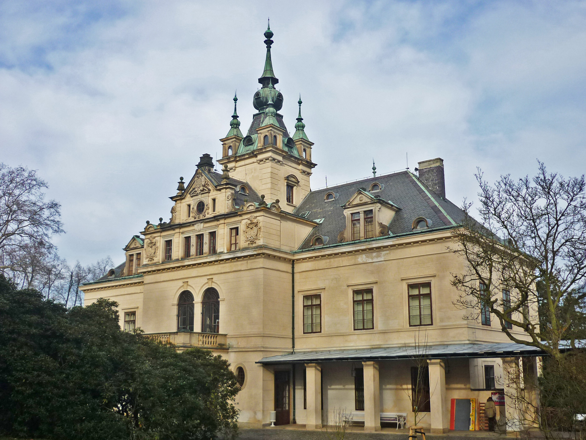 Schloss in Großpriesen, Gartenseite